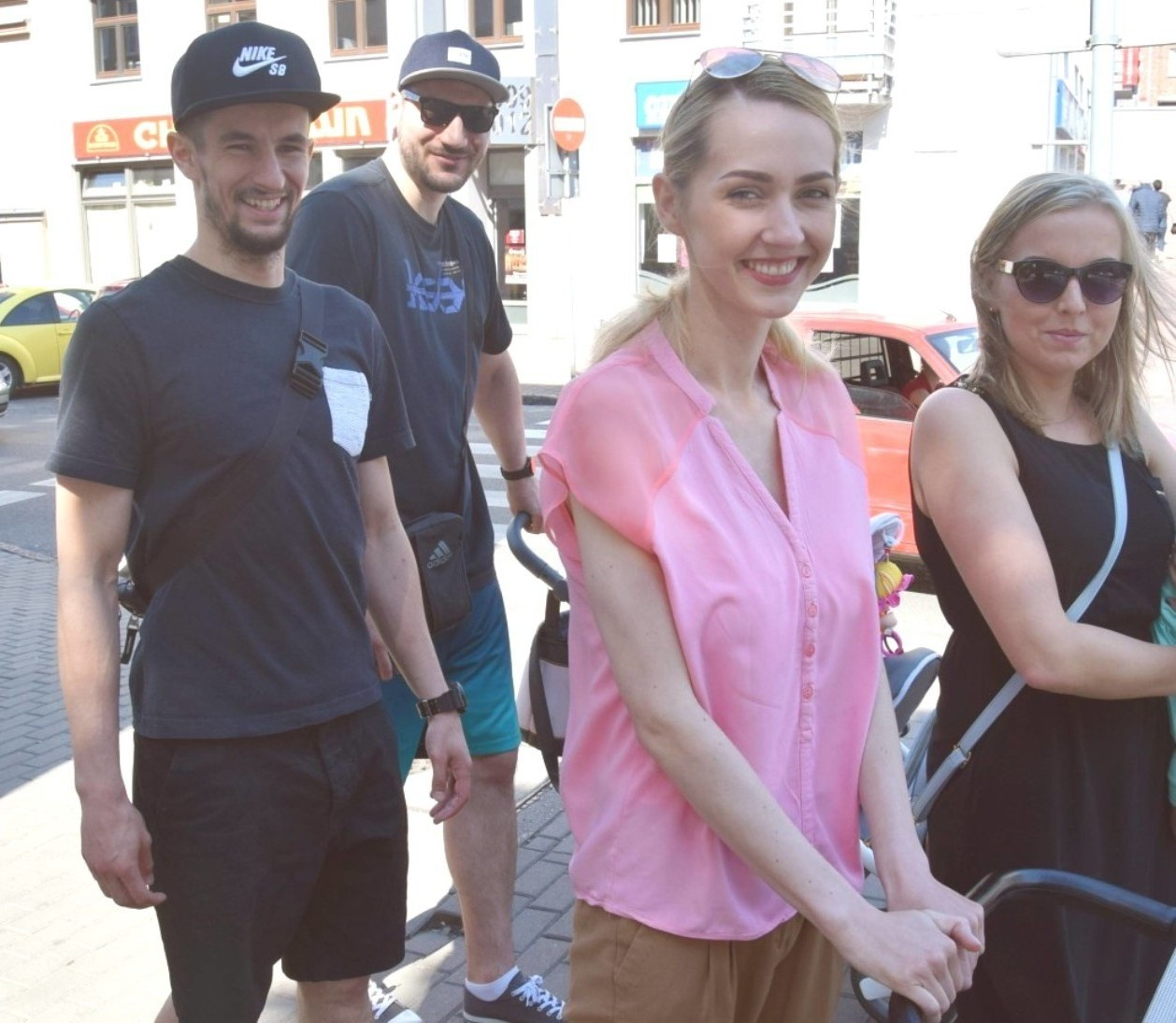 Konrad Koziorowicz, 18.05.2018